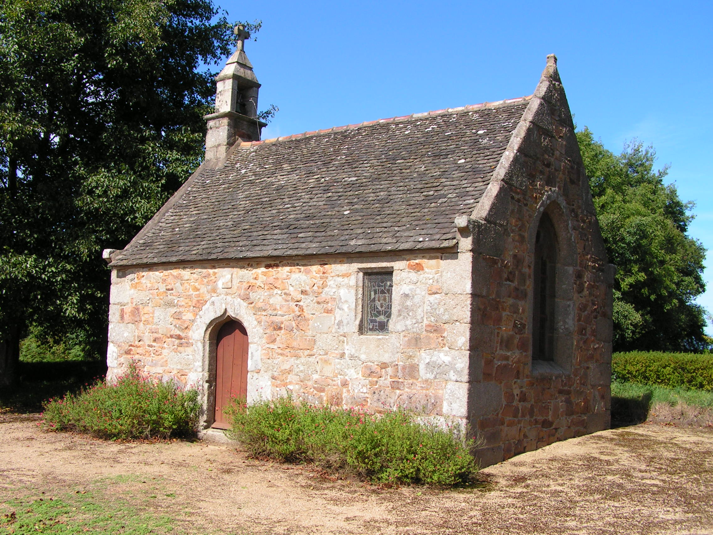 La Chapelle Saint-Nicodème à Lannion vue depuis l'Est.